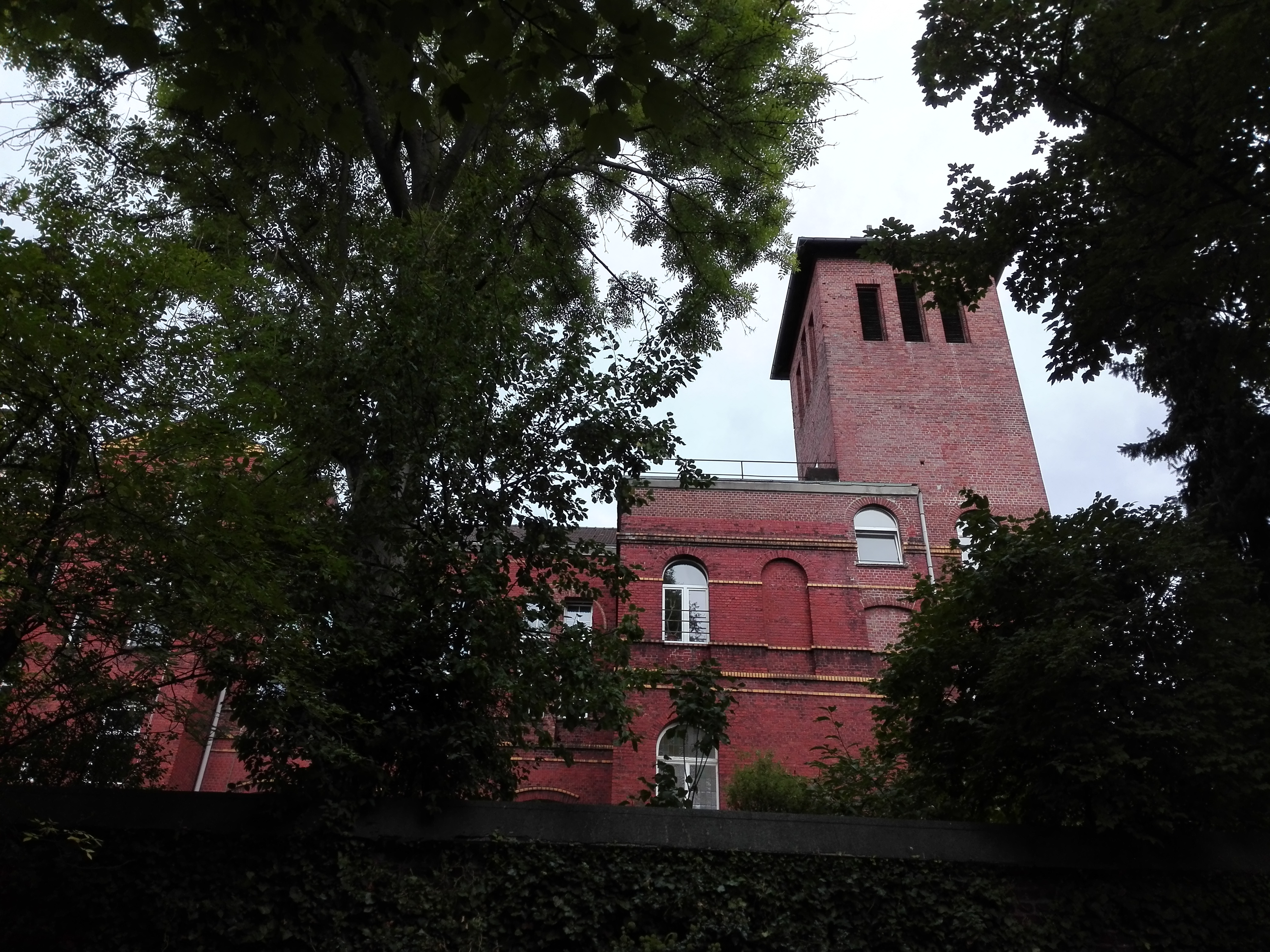 Ansichten der serbisch-orthodoxen Kirche in Wuppertal-Elberfeld, vormals Lutherkirche